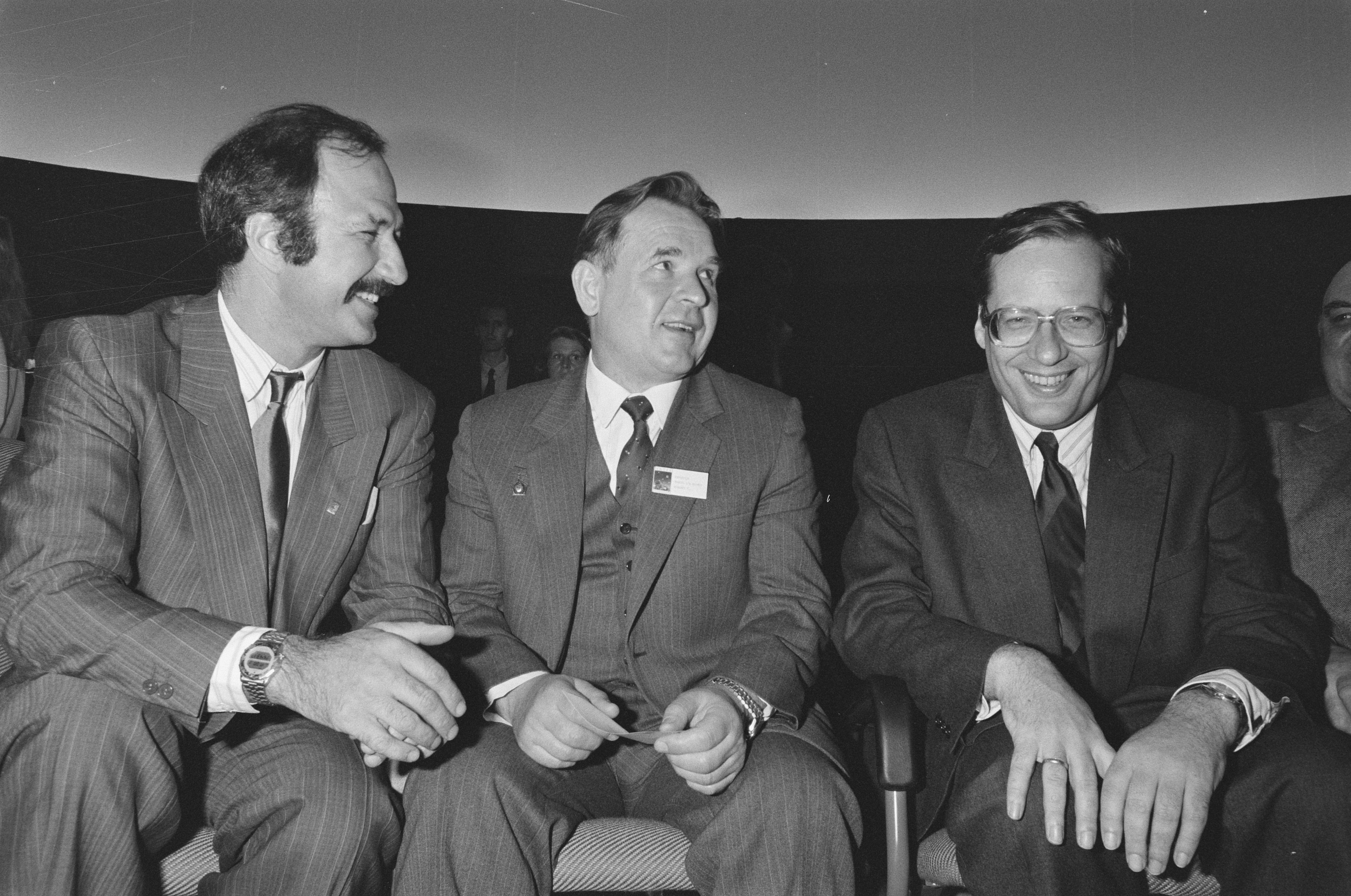 Collectie / Archief : Fotocollectie Anefo Reportage / Serie : [ onbekend ] Beschrijving : Opening Planetarium in Artis; minister Deetman (r) met astronauten Wubbo Ockels (l) en Valeri Koebasov (m) Datum : 2 mei 1988 Locatie : Amsterdam, Noord-Holland Trefwoorden : ASTRONAUTEN, Openingen, PLANETARIUM Persoonsnaam : Deetman, Wim, Koebasov, Valeri, Ockels, Wubbo Fotograaf : Croes, Rob C. / Anefo Auteursrechthebbende : Nationaal Archief Materiaalsoort : Negatief (zwart/wit) Nummer archiefinventaris : bekijk toegang 2.24.01.05 Bestanddeelnummer : 934-2414